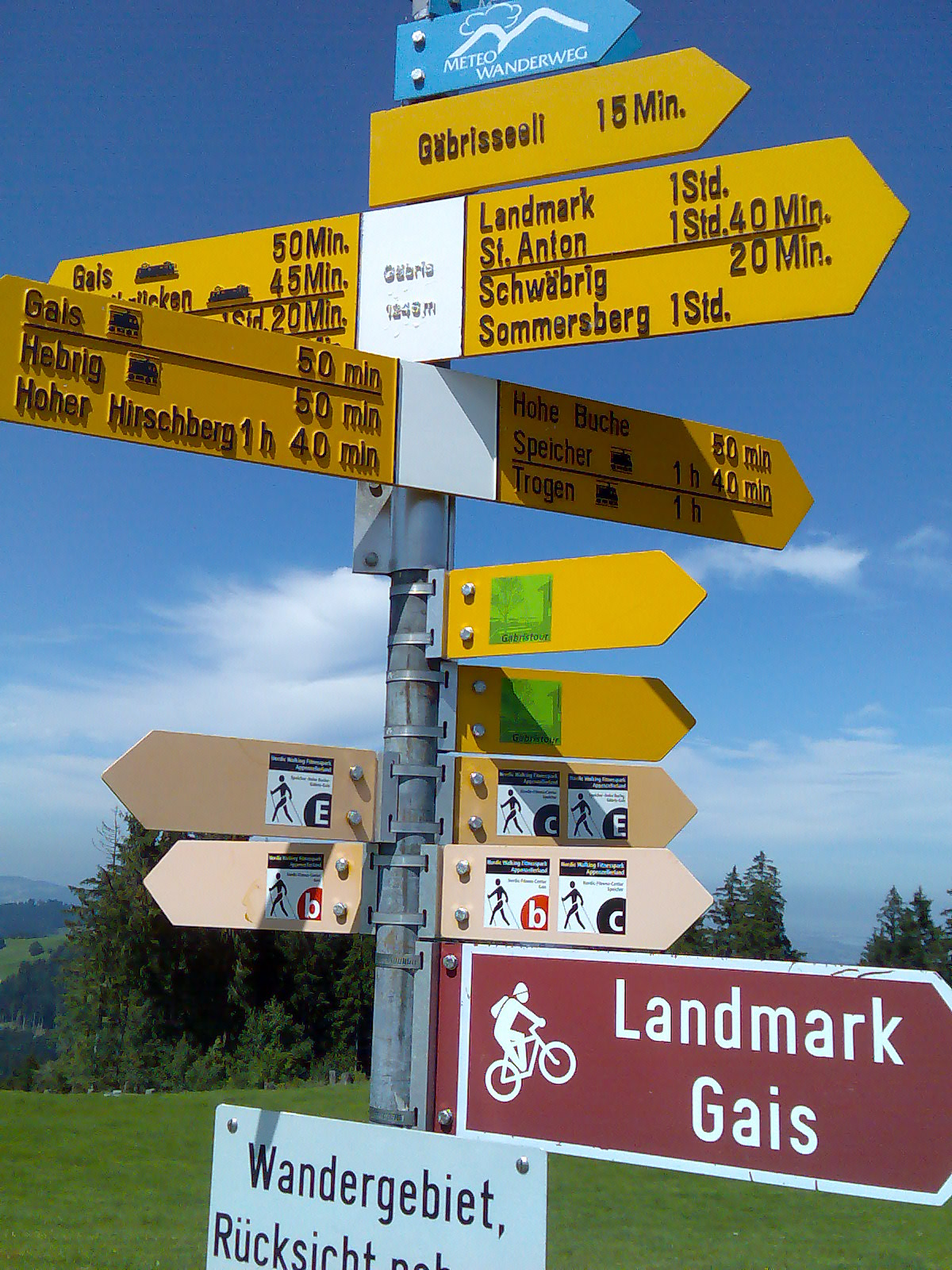 Wegweiser für Wanderer, Biker usw. auf dem Parkplatz nördlich des Restaurantes Gäbris. Die Höhenangabe im weissen Mittelteil - 1246 m (auf der Landeskarte der Schweiz; Gais Blatt Nr. 1285 steht 1246.8 m). Blickrichtung Norden.